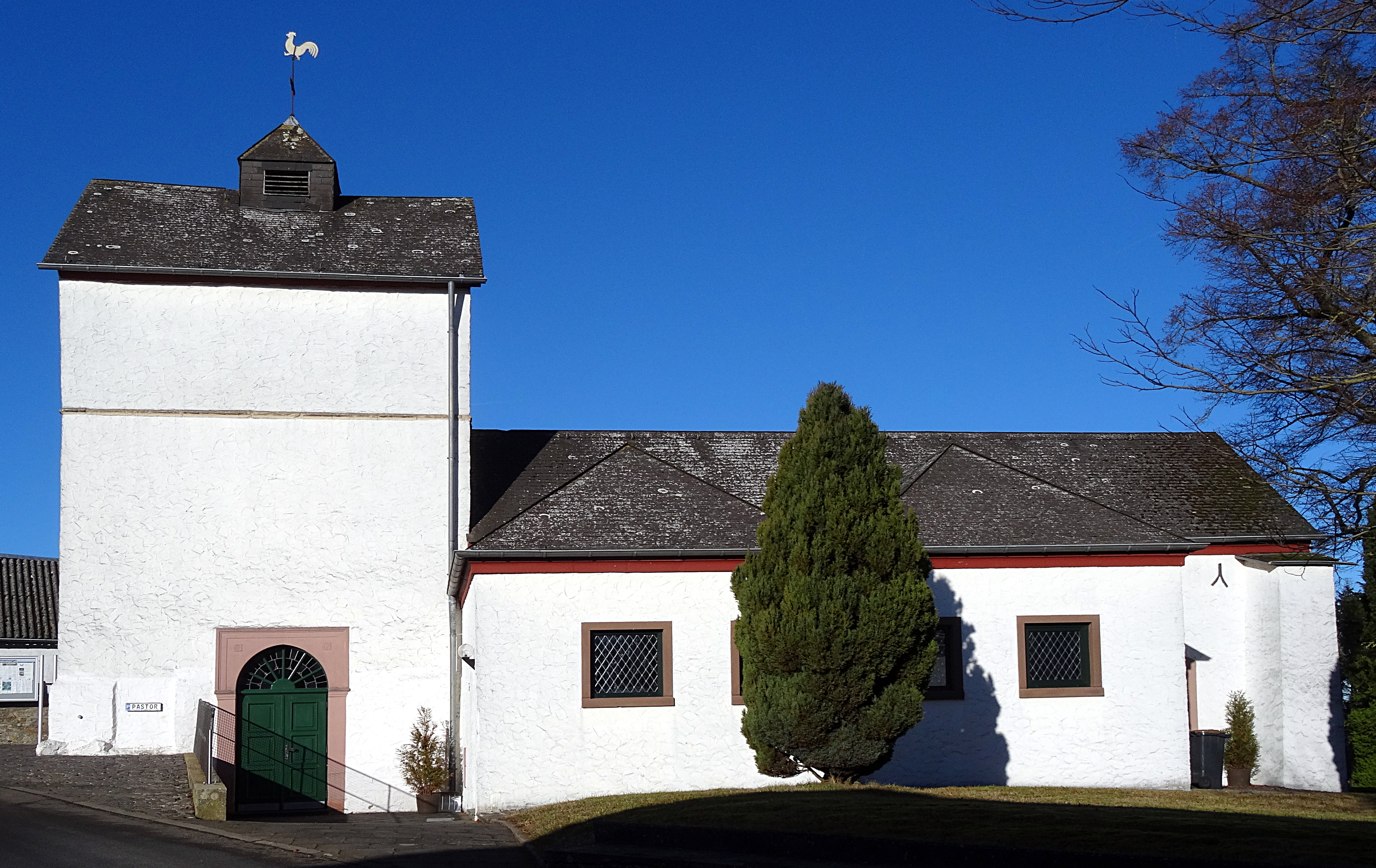 Baudenkmal kath. Kapelle St. Dionysius, Waldorfstr. 38, Waldorf